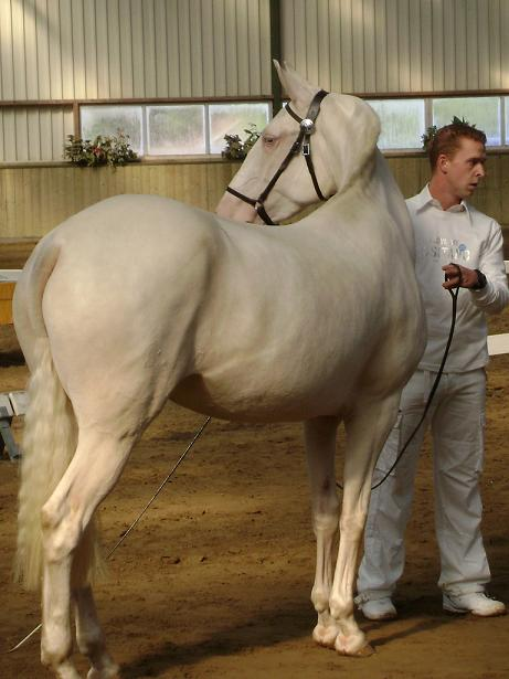 Cremello Lusitano